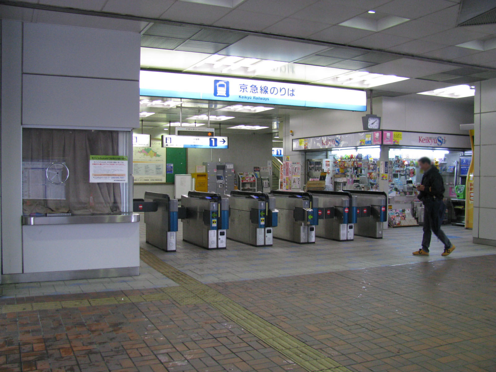 京浜急行久里浜線YRP野比駅